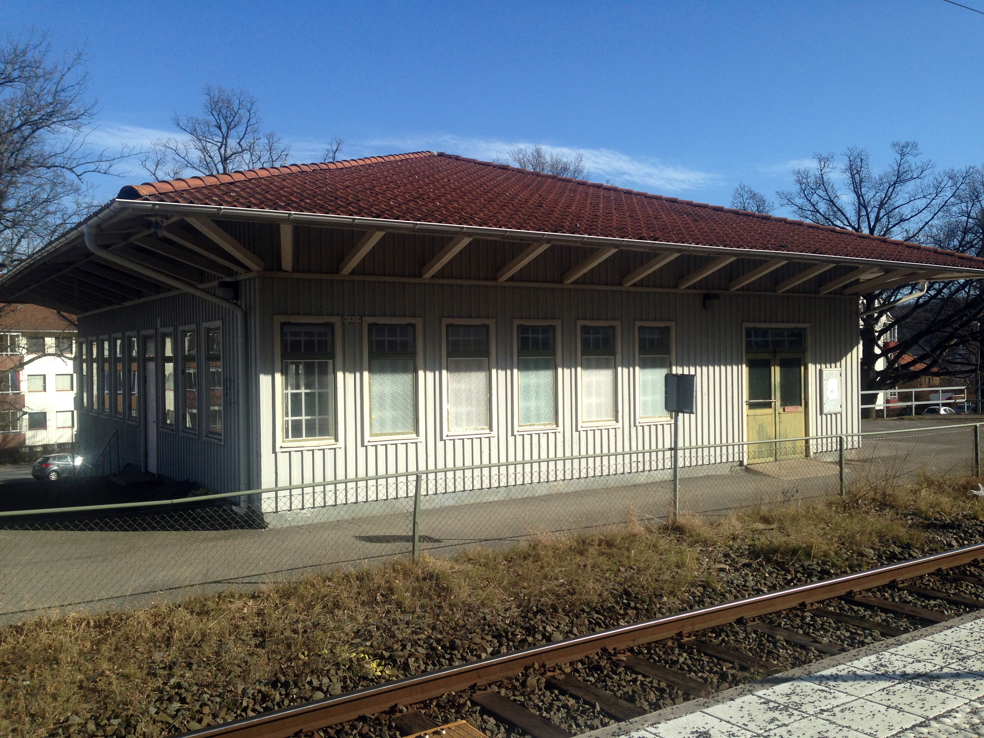 Huskvarna station: Byggnadsår 1944